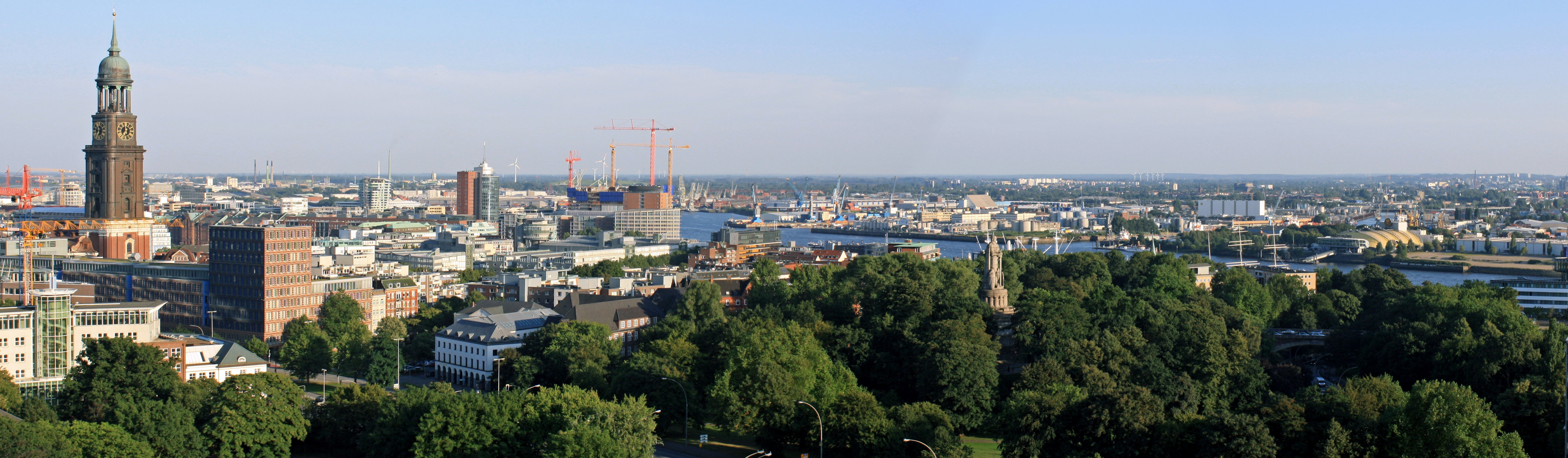 Hamburg Panorama Michel